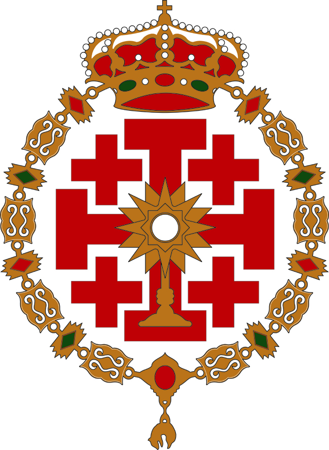 Escudo de la Real e Ilustre Hermandad Sacramental de Ntro. Padre Jesús de la Pasión y María Santísima del Refugio (Huelva)